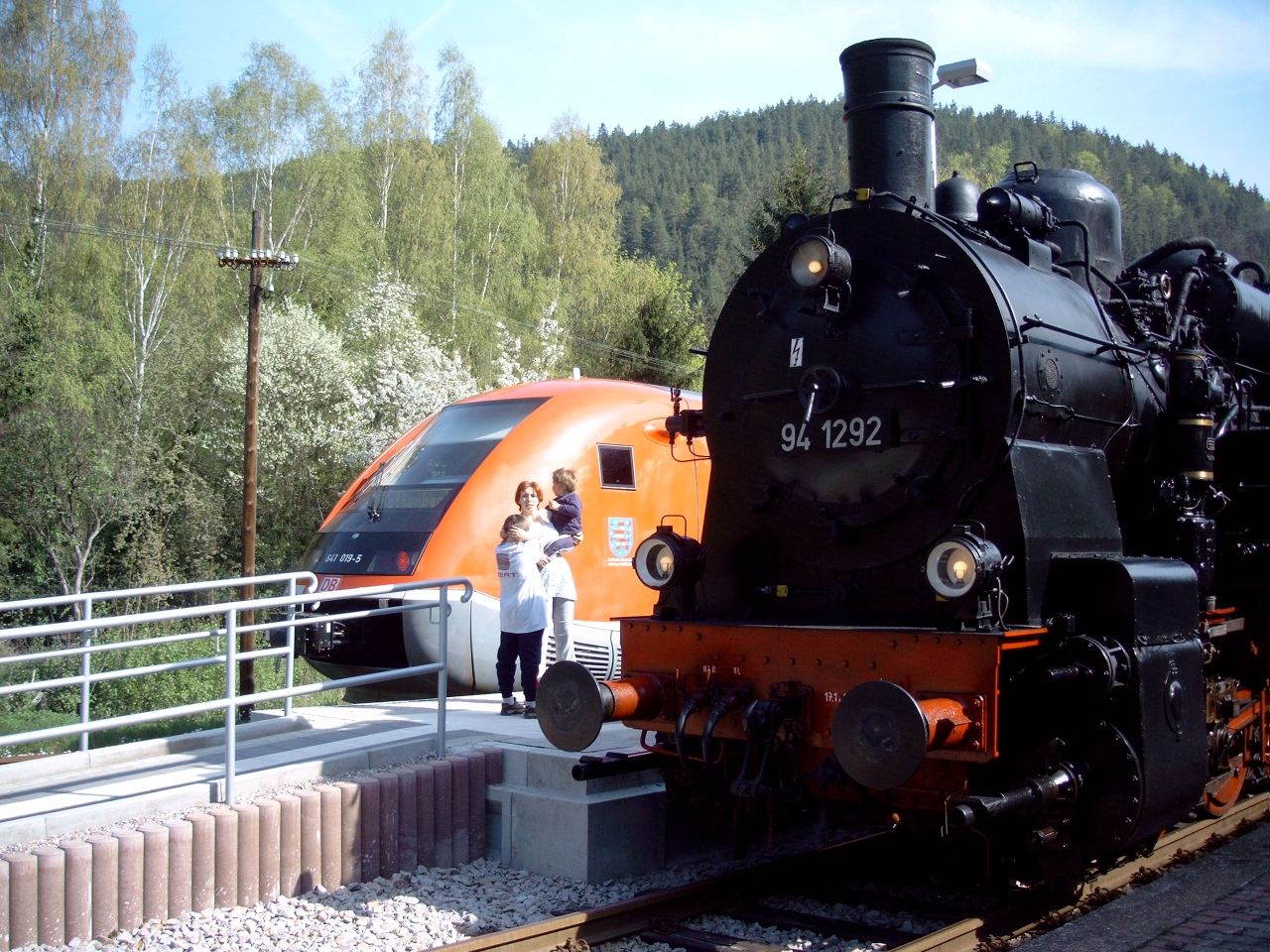 Gestern und Heute